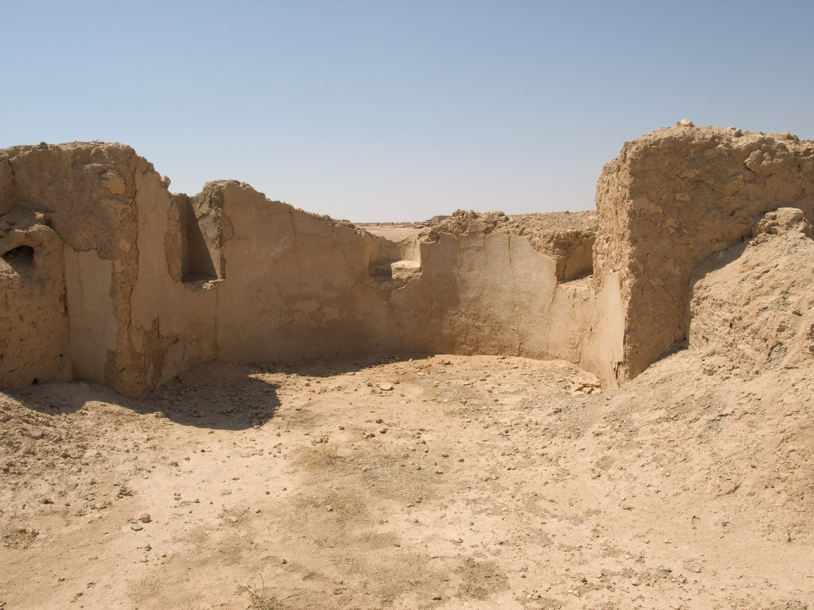 Abside du triclinium du palais du Dux Ripae à Doura-Europos.